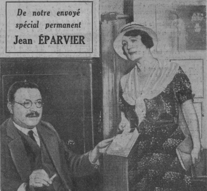 Marthe Richard et Georges Ladoux probablement en 1932